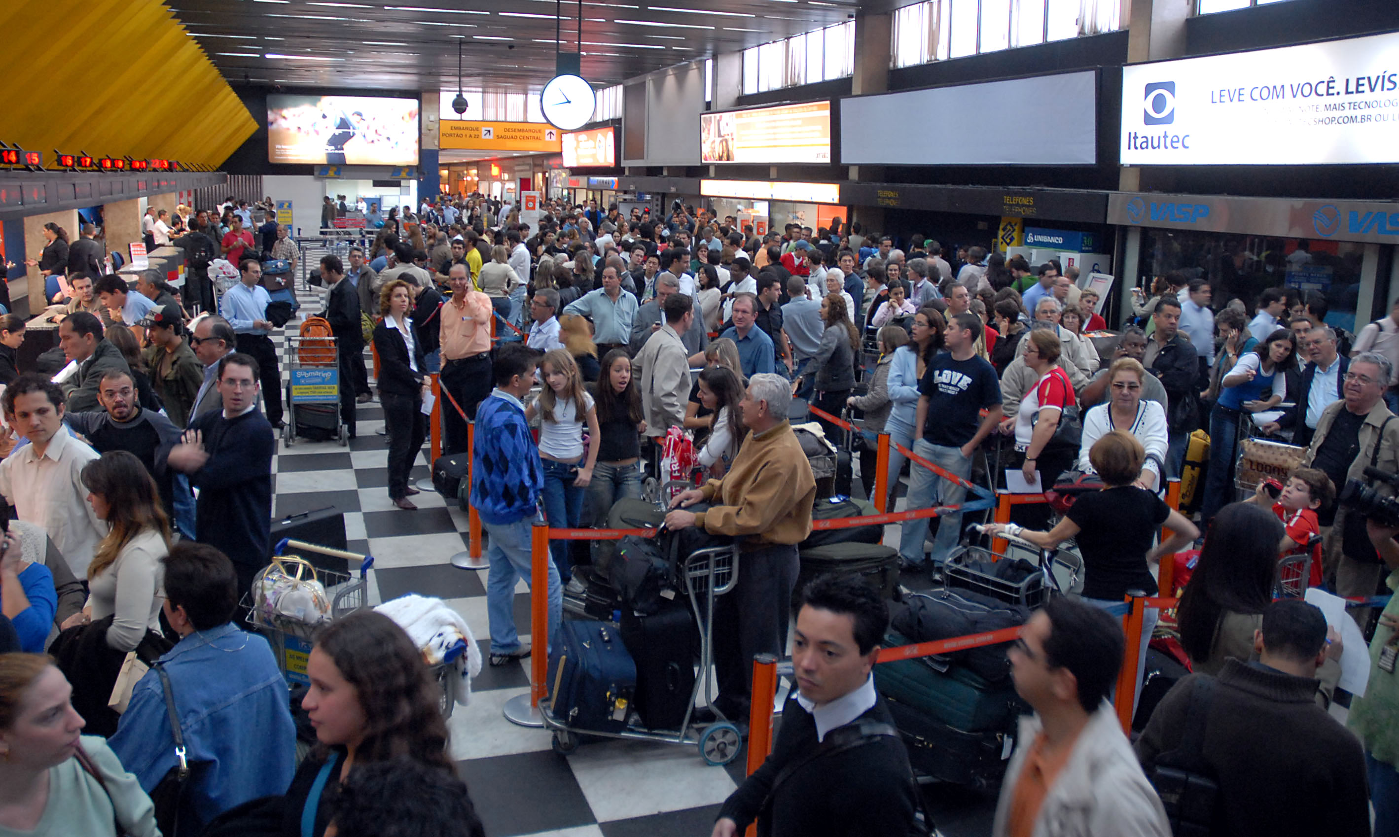 São Paulo - Filas no aeroporto de Congonhas, na zona sul de São Paulo, fechado nesta manhã para pouso e decolagem, devido a problemas meteorológicos e a restrições na pista auxiliar .